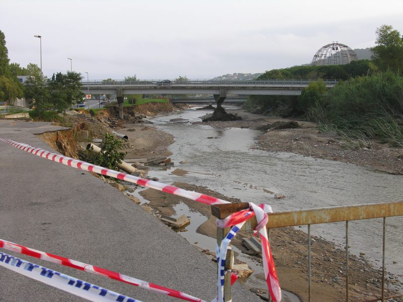 Riera de Calonge després del diluvi de l'octubre 2005 - Riera de Calonge after de 2005 Floods